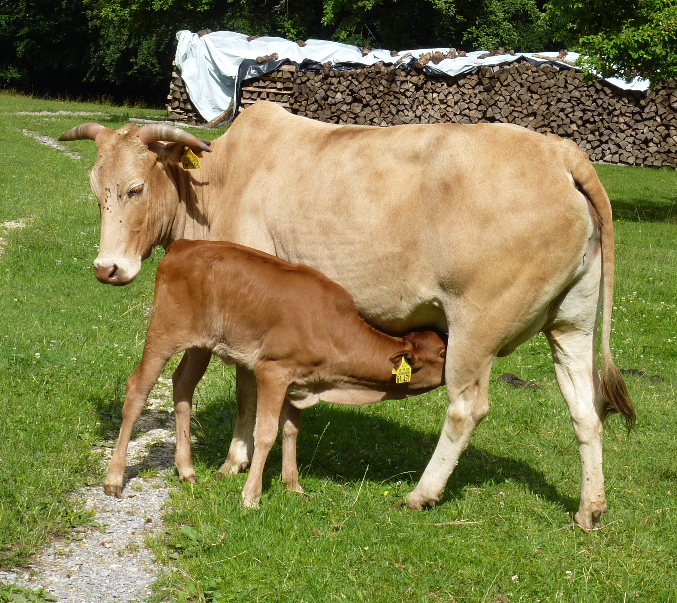 säugende Zebukuh